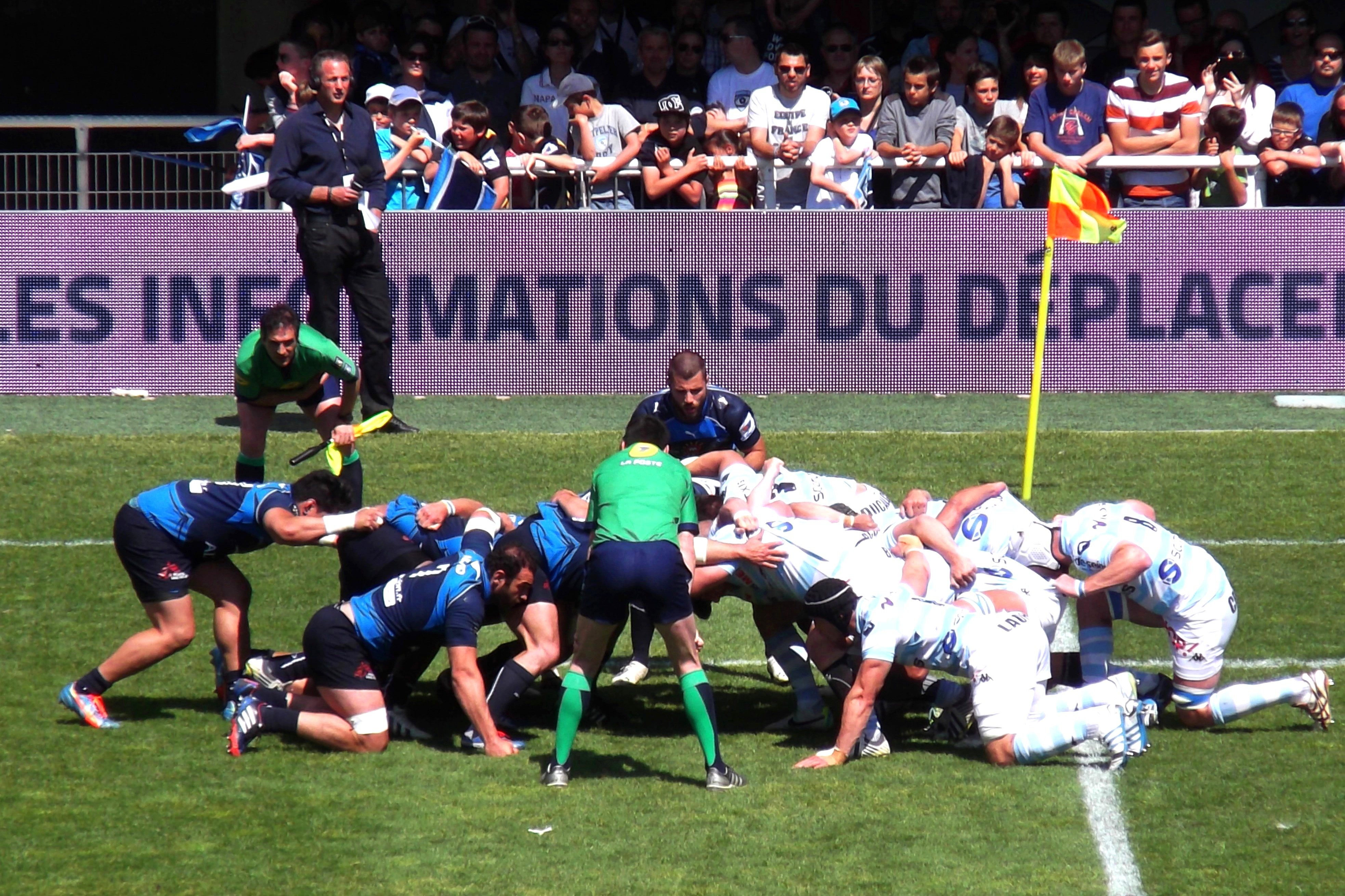 MHR vs RM92, 3 mai 2014.